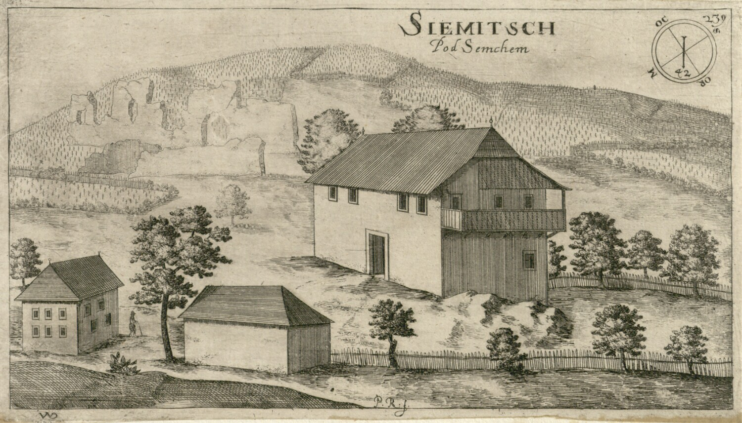 Dvorec Semič